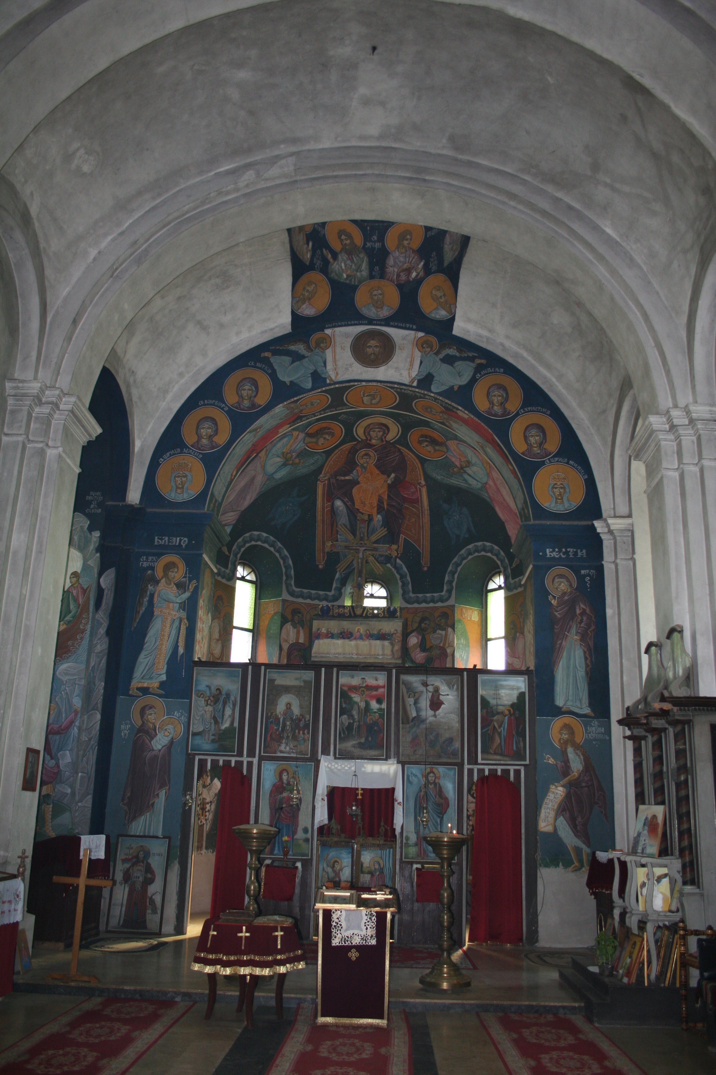 Crkva Uspenja Presvete Bogorodice, Lipolist